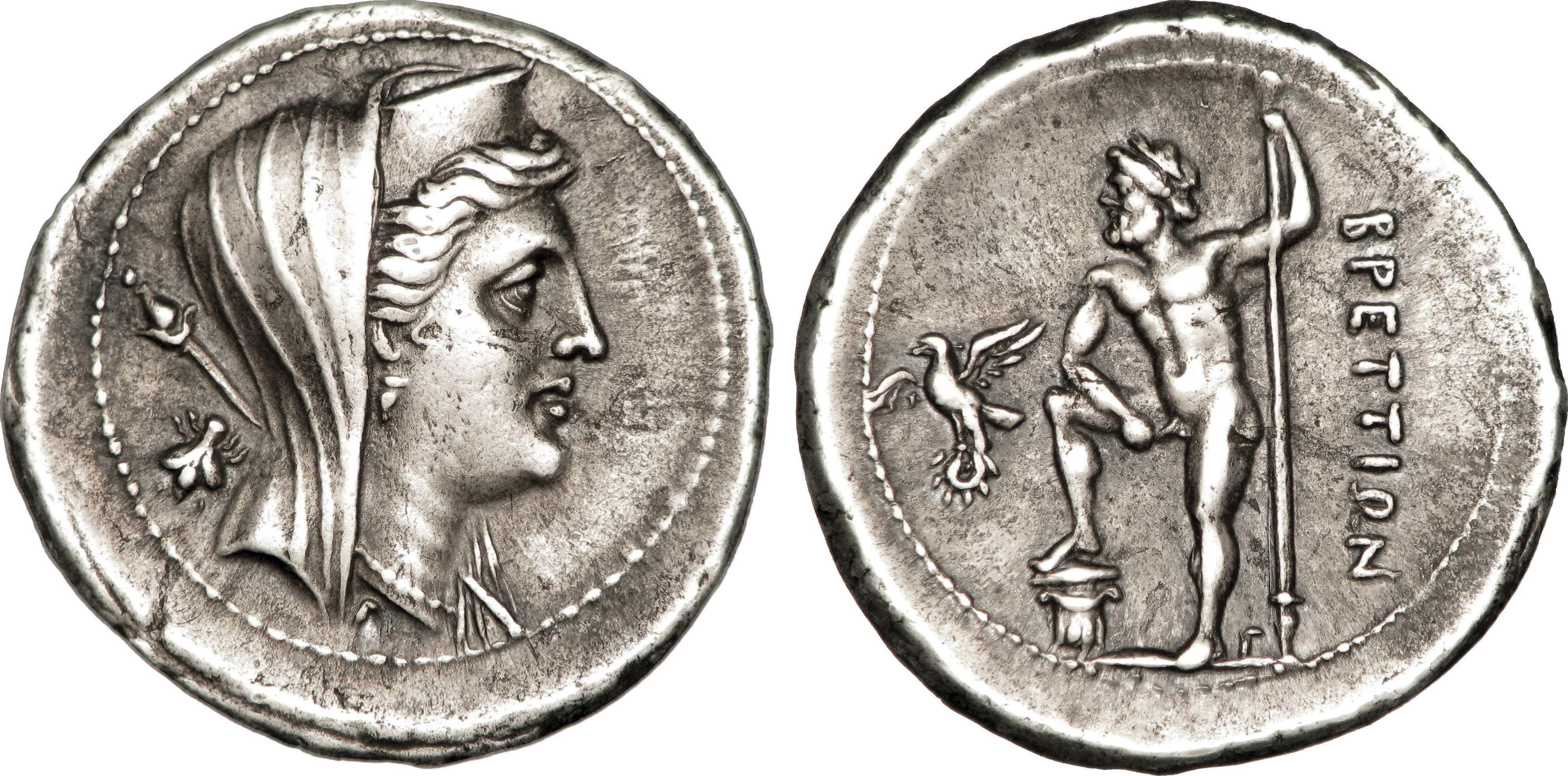 Nom de l'atelier : Bruttium, Locres ou Crotone Métal : argent Diamètre : 20,5mm Axe des coins : 3h. Poids : 4,70g. Titulature avers : Anépigraphe. Description avers : Tête voilée d’Héra Lakinia à droite, coiffée du polos, le sceptre lotiforme sur l’épaule, avec boucles d’oreille et collier de perles ; une mouche derrière la tête ; grènetis circulaire perlé. Légende avers : G Description revers : Zeus nu debout à gauche, le pied droit posé sur une colonne ionique, le bras droit appuyé sur sa cuisse droite et tenant un long sceptre bouleté de la main gauche ; dans le champ à gauche, petit aigle volant à gauche les ailes déployées, tenant une couronne dans ses serres ; grènetis circulaire perlé. Légende revers : BRETTIWN/ G Traduction revers : (des Brettiens).